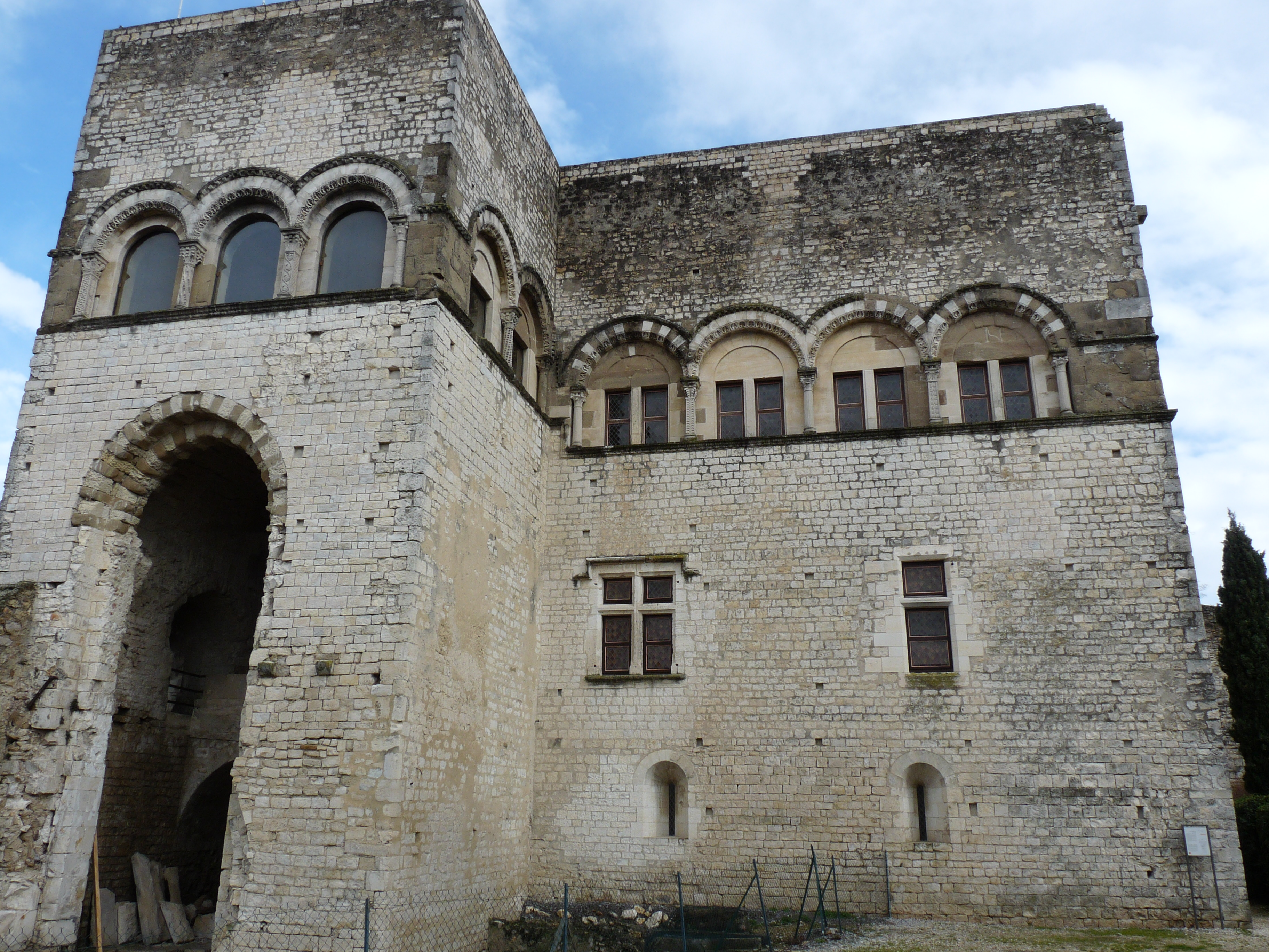 Façade ouest du Château des Adhémar